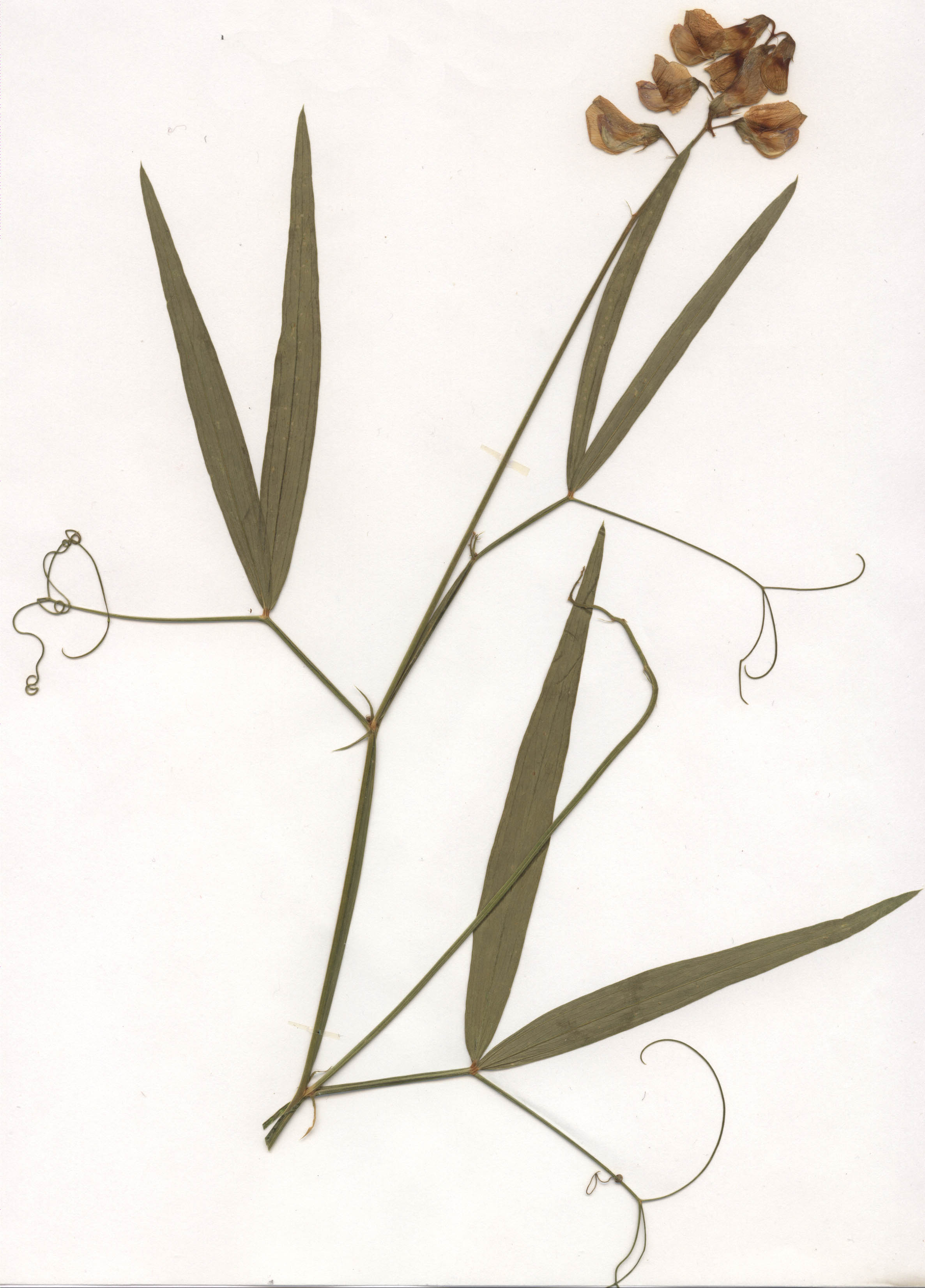 Lathyrus sylvestris, eigener Herbarbeleg von 1980 aus Unterfranken